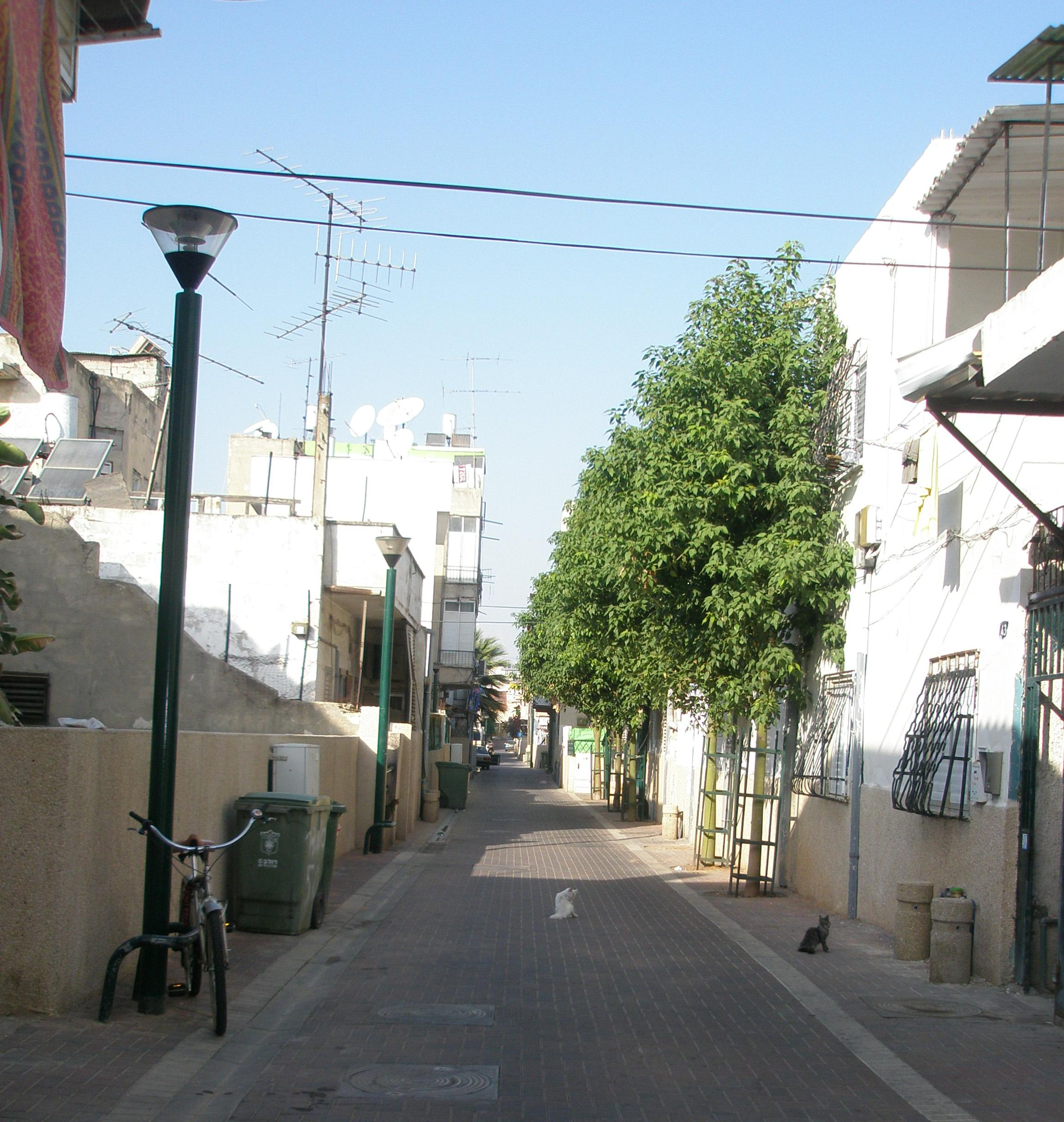 A small street in Shkunat hatikva, Tel Aviv